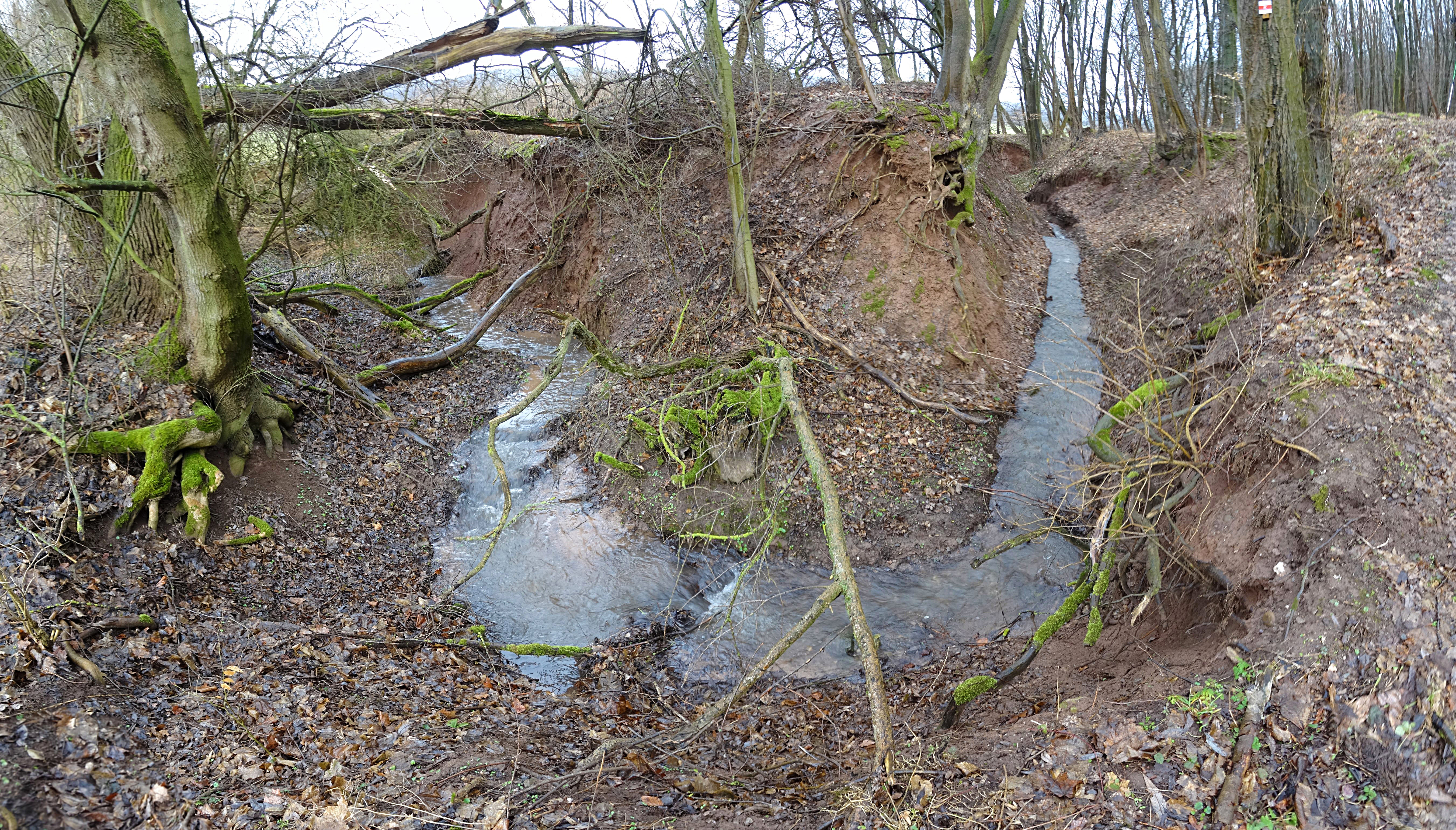 Graben des Hainröder Baches beim erstmaligen Auftreffen auf den Ankenberg